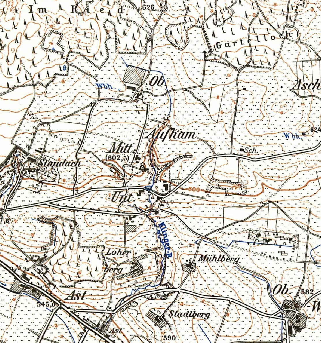 Karte von 1957, in der Aufham noch in Unteraufham (der südöstliche Teile), Mitteraufham (um die Kirche) und Oberaufham (der nördliche Teil) unterteilt ist.